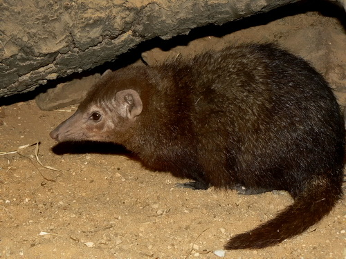 Длинноносый кузиманзе (Crossarchus obscurus), Пльзенский зоопарк (Zoological and Botanical Garden Plzen), февраль 2011 года